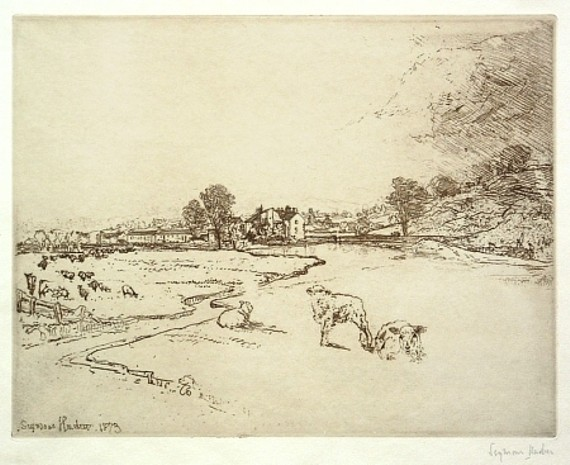 Sawley Abbey